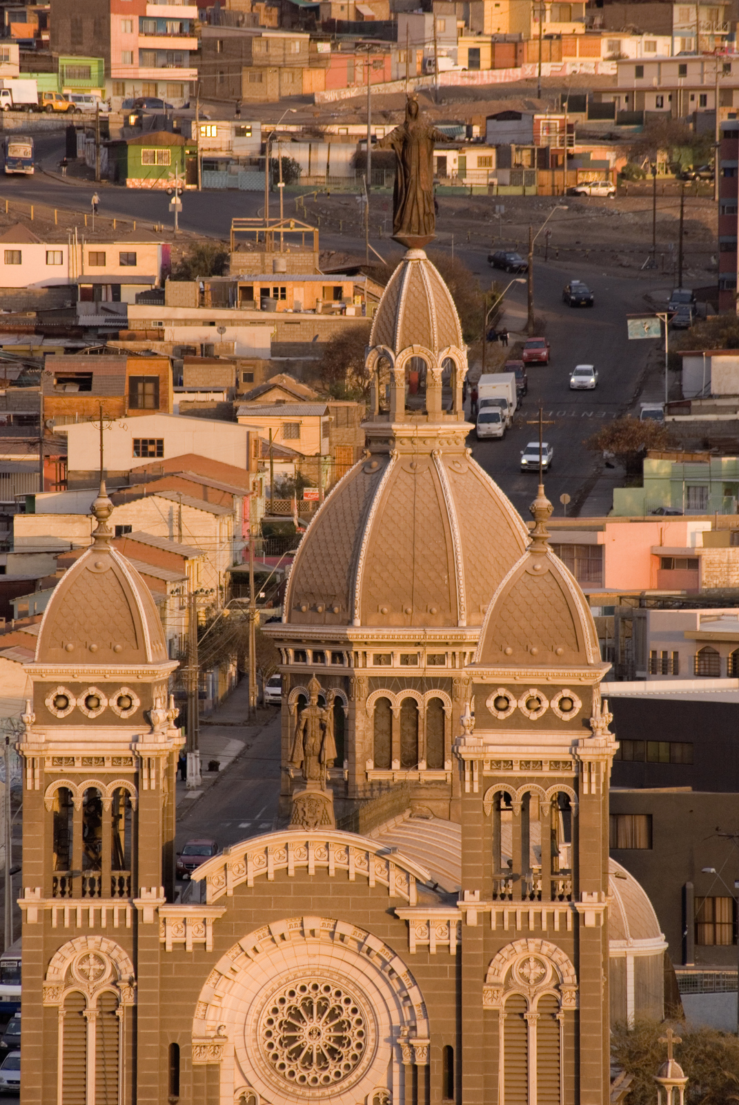 Corazon de Maria